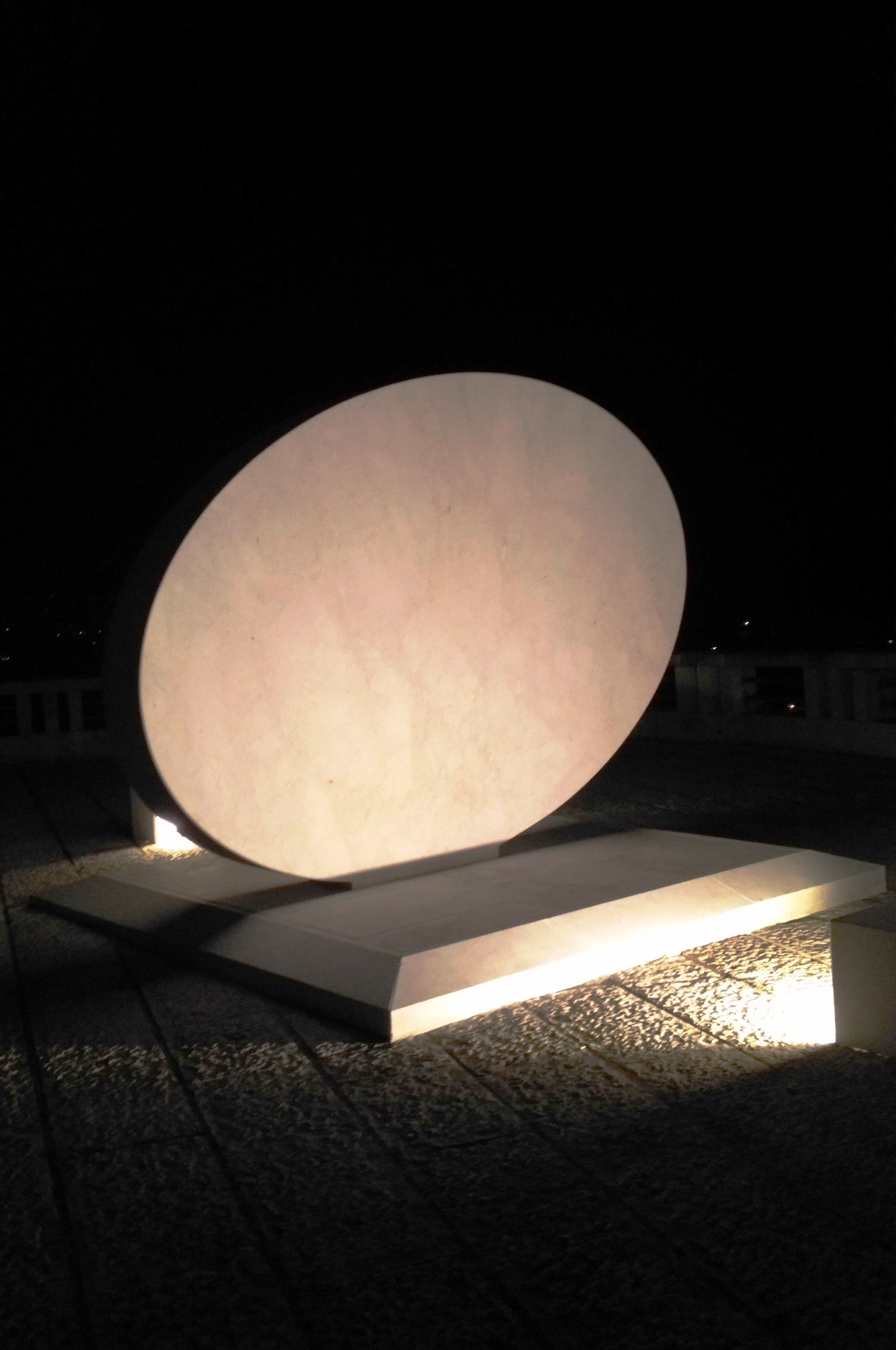 Ovale in marmo perlato su panorama by night, Piazza Bagolino in Alcamo